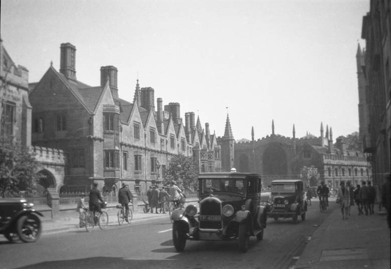 High Street och Magdalen College vid Oxfords universitet. Motiv: Oxford Kategori: Stadsmiljö, Universitet High Street och Magdalen College vid Oxfords universitet.